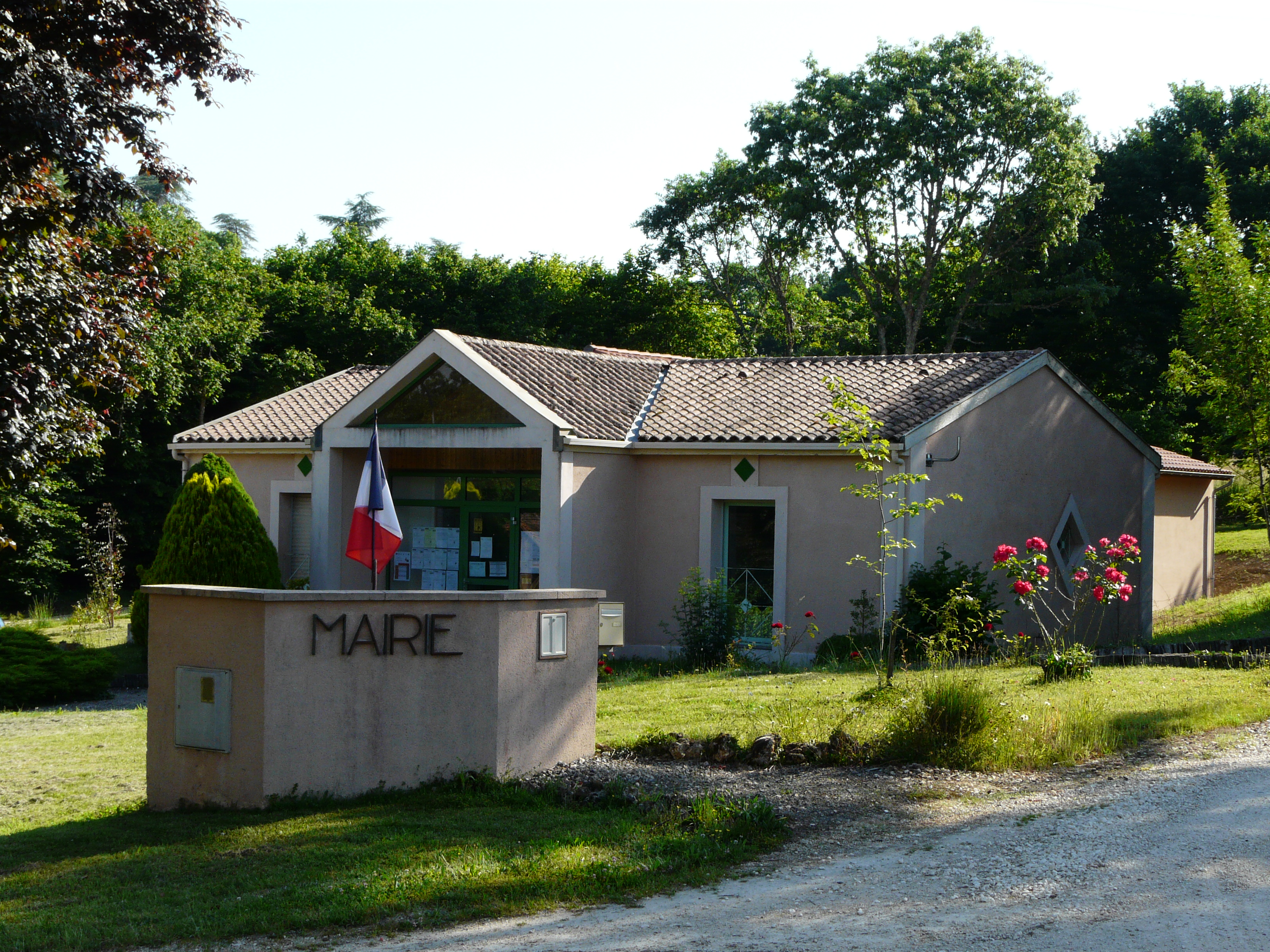 La mairie de Creyssensac-et-Pissot, Dordogne, France.